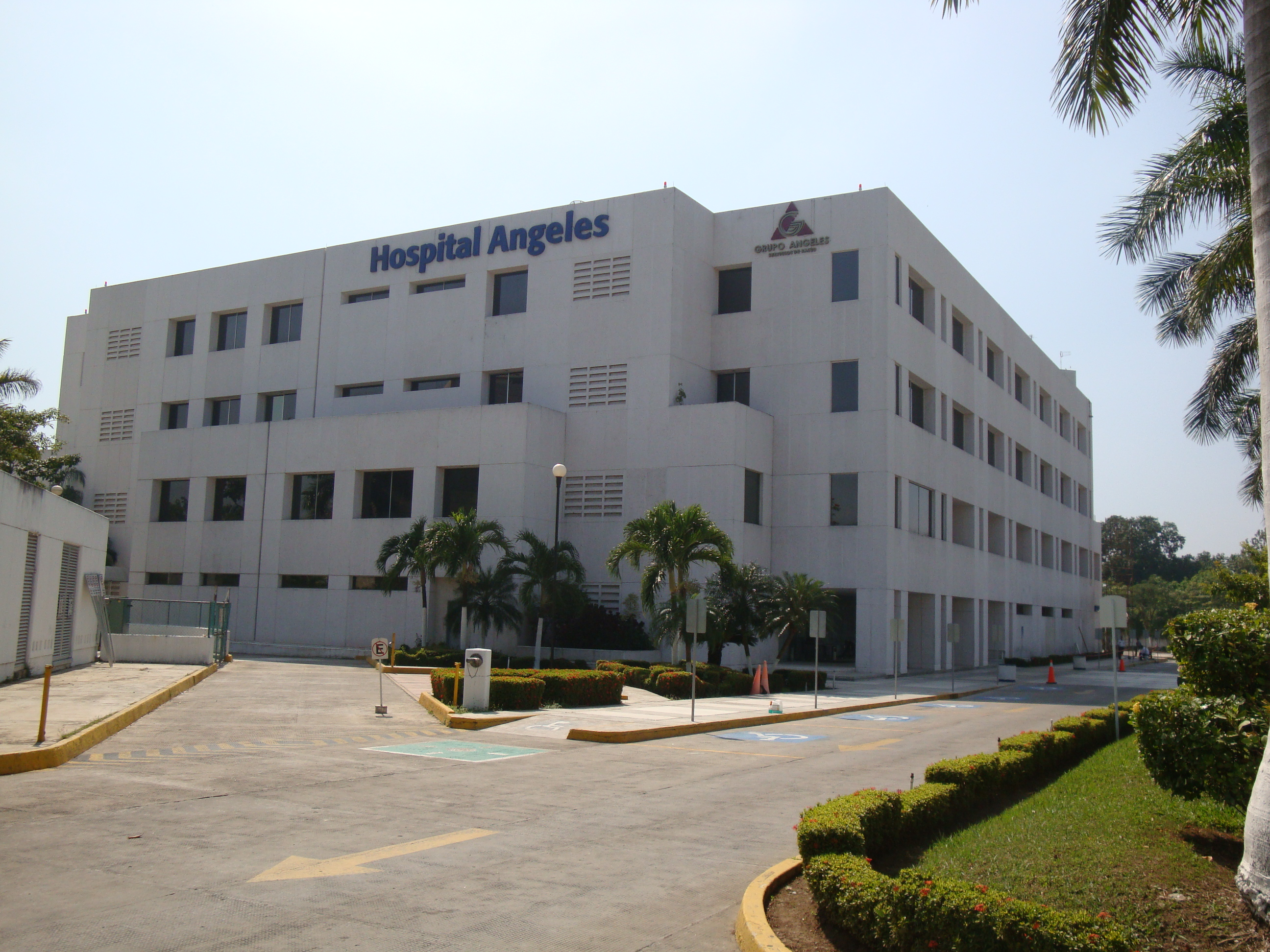 Torre de consultorios del Hospital Angeles, en la ciudad de Villahermosa, estado de Tabasco, México.